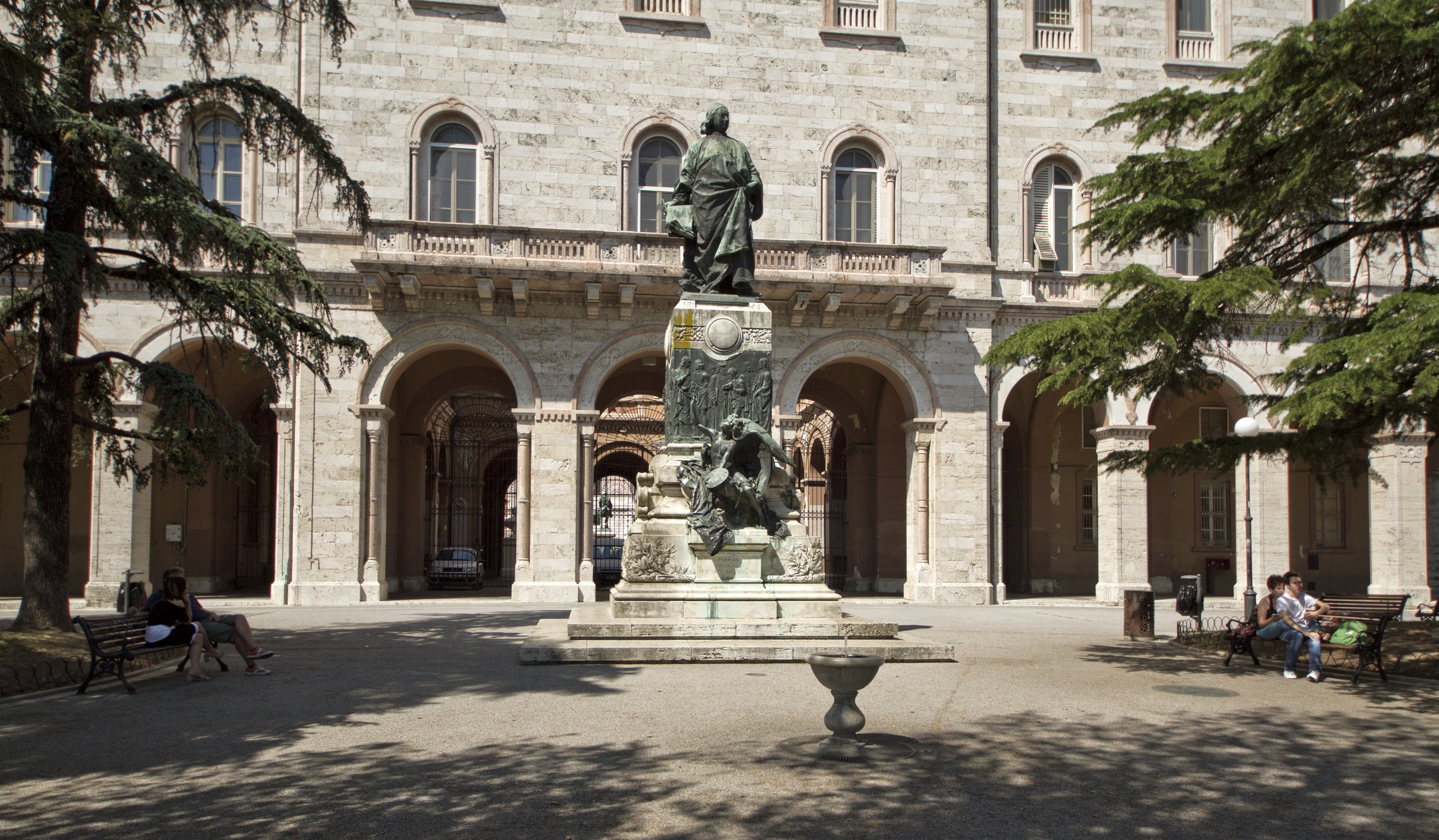 Perugia, Italy